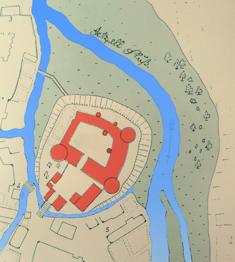 Grundriss von Schloss Lüchow, nachträglich koloriert